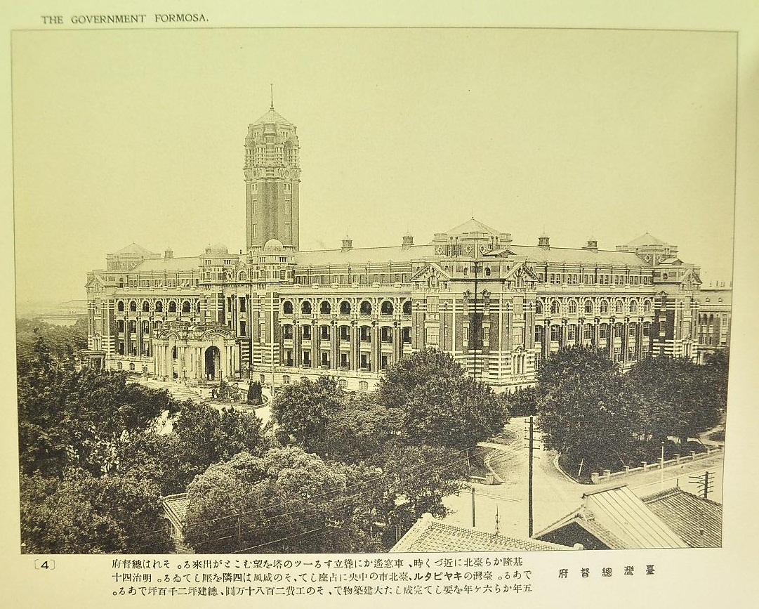 臺灣之風景